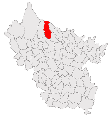 Categorie:Hărţi ale judeţului Buzău